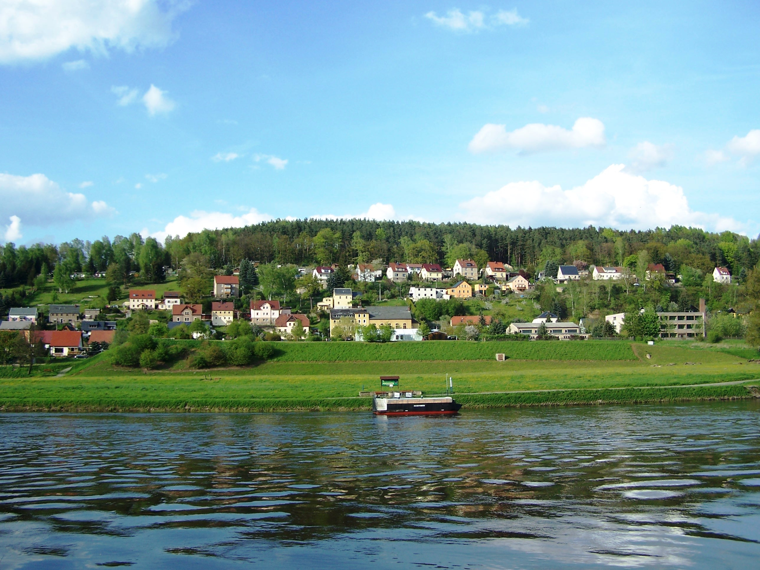 Blick auf Prossen, Sächsische Schweiz vom anderen Elbufer aus